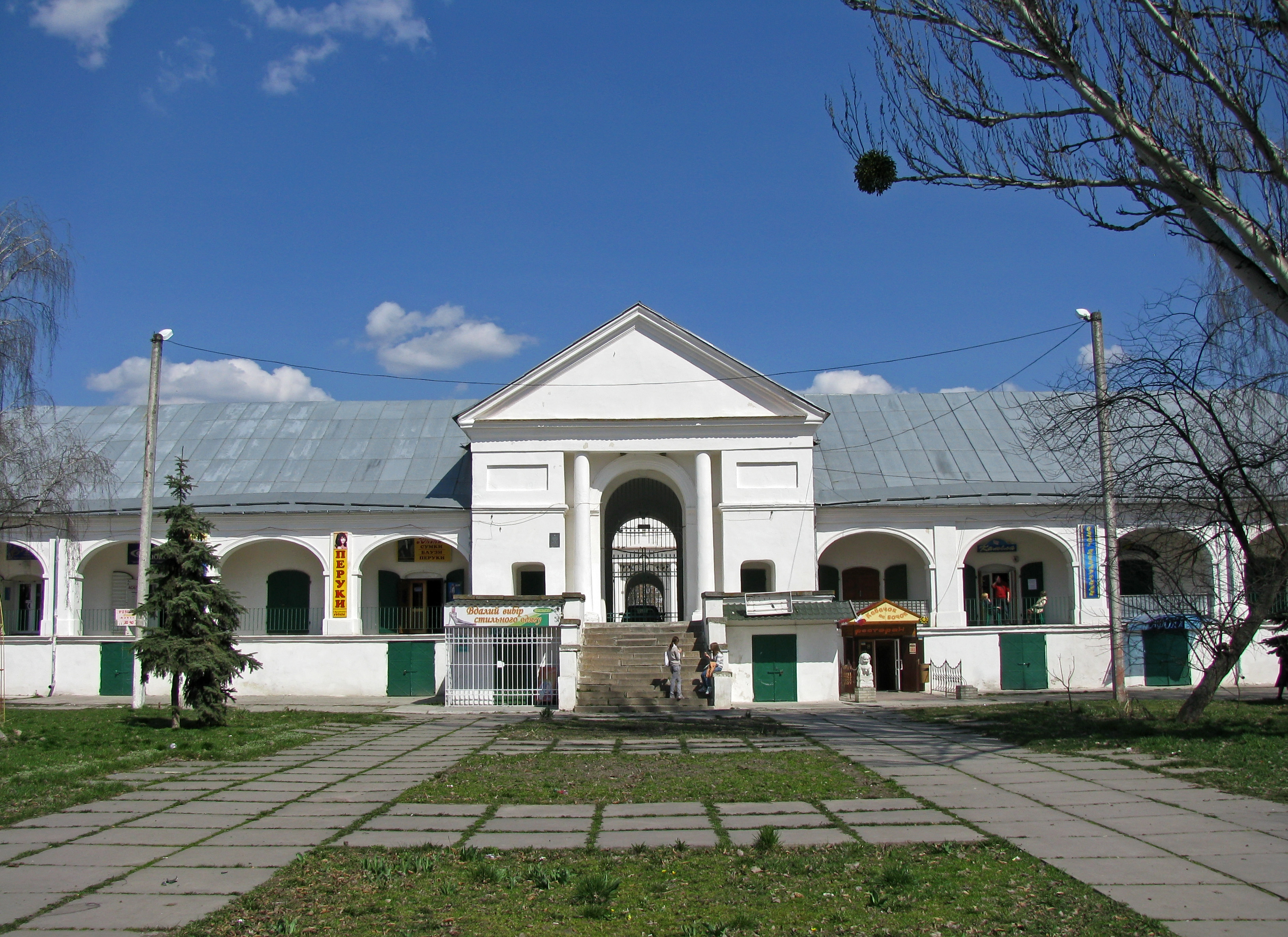 Торговi ряди (мур.), Біла Церква, Торгова площа